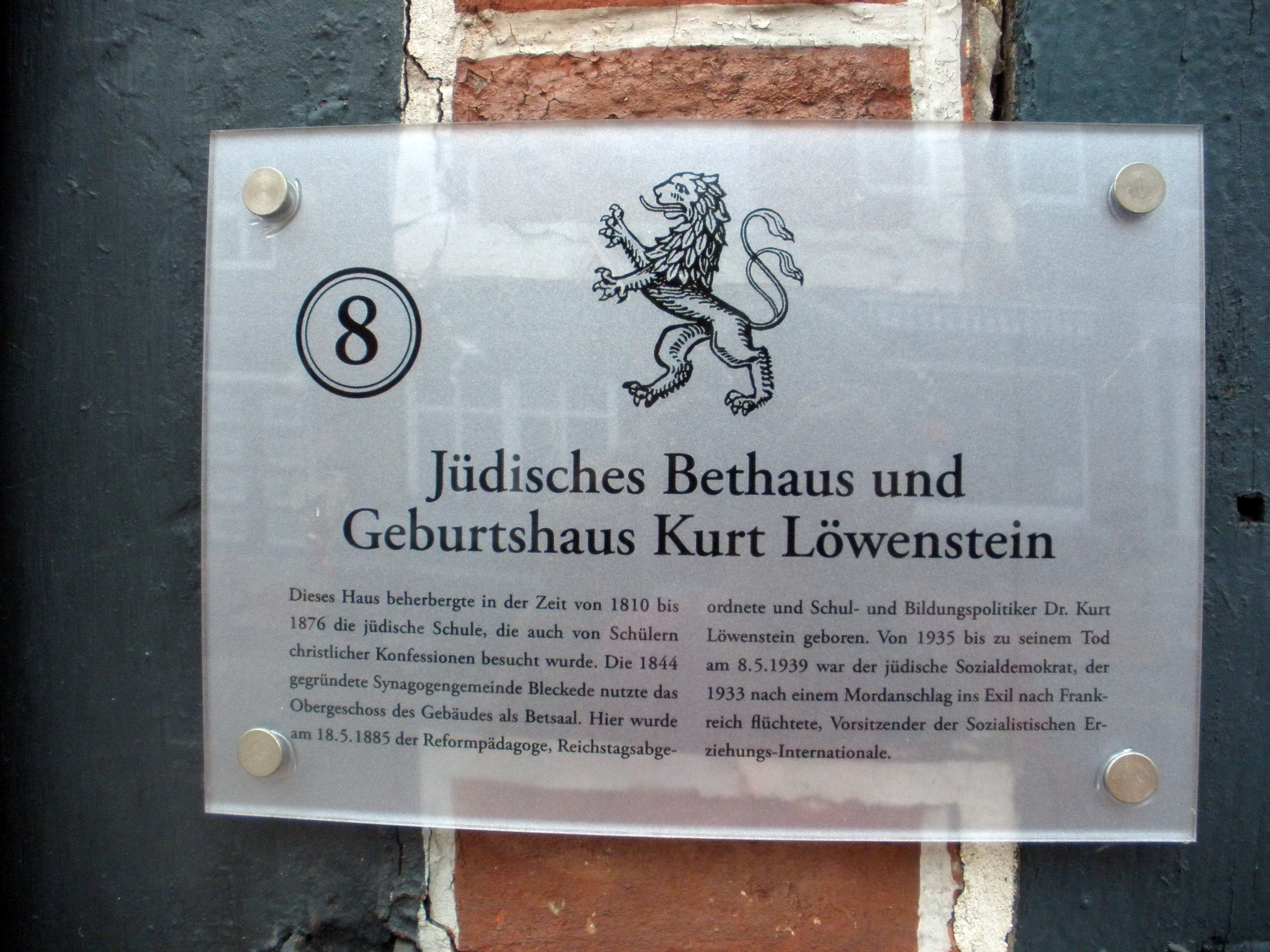 gedenktafel am geburtshaus kurt löwenstein in bleckede